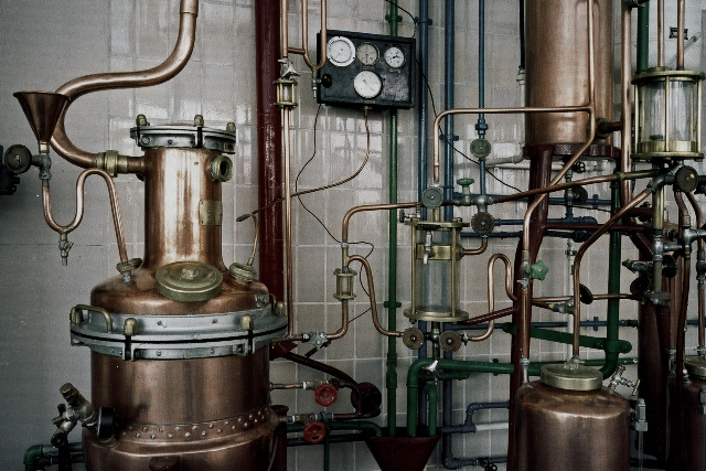 Vakuumdestillationsapparatur von 1924